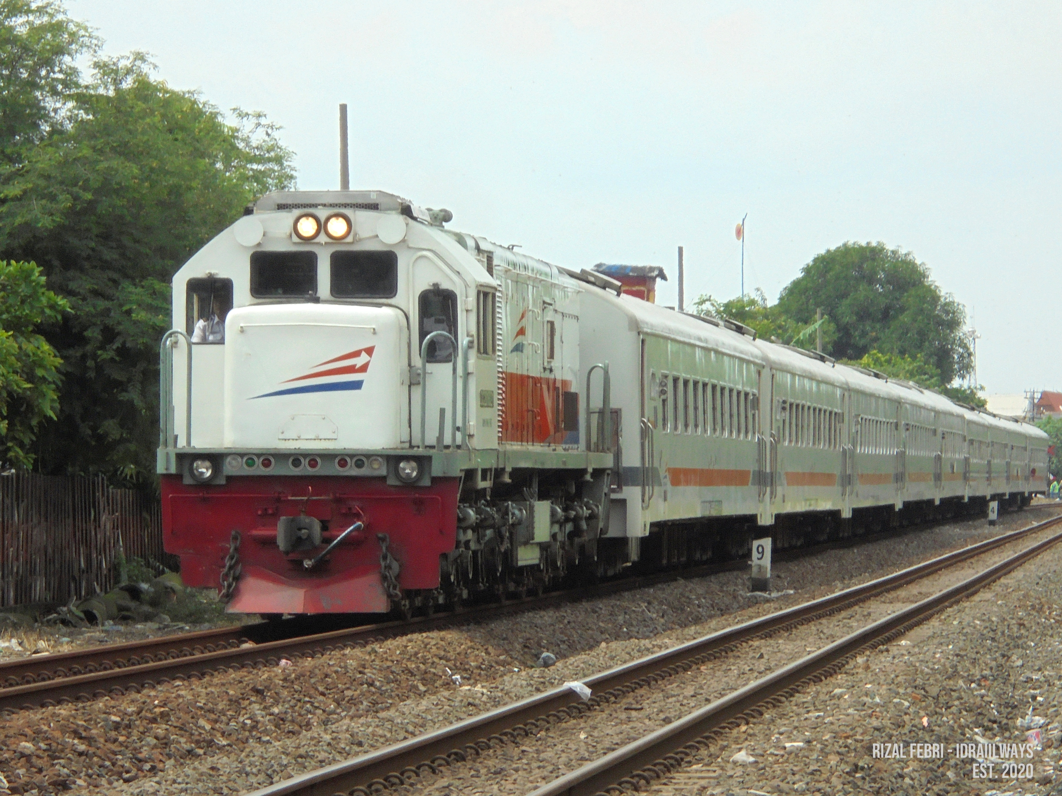 Kereta api Logawa saat akan memasuki Stasiun Surabaya Gubeng, 2020